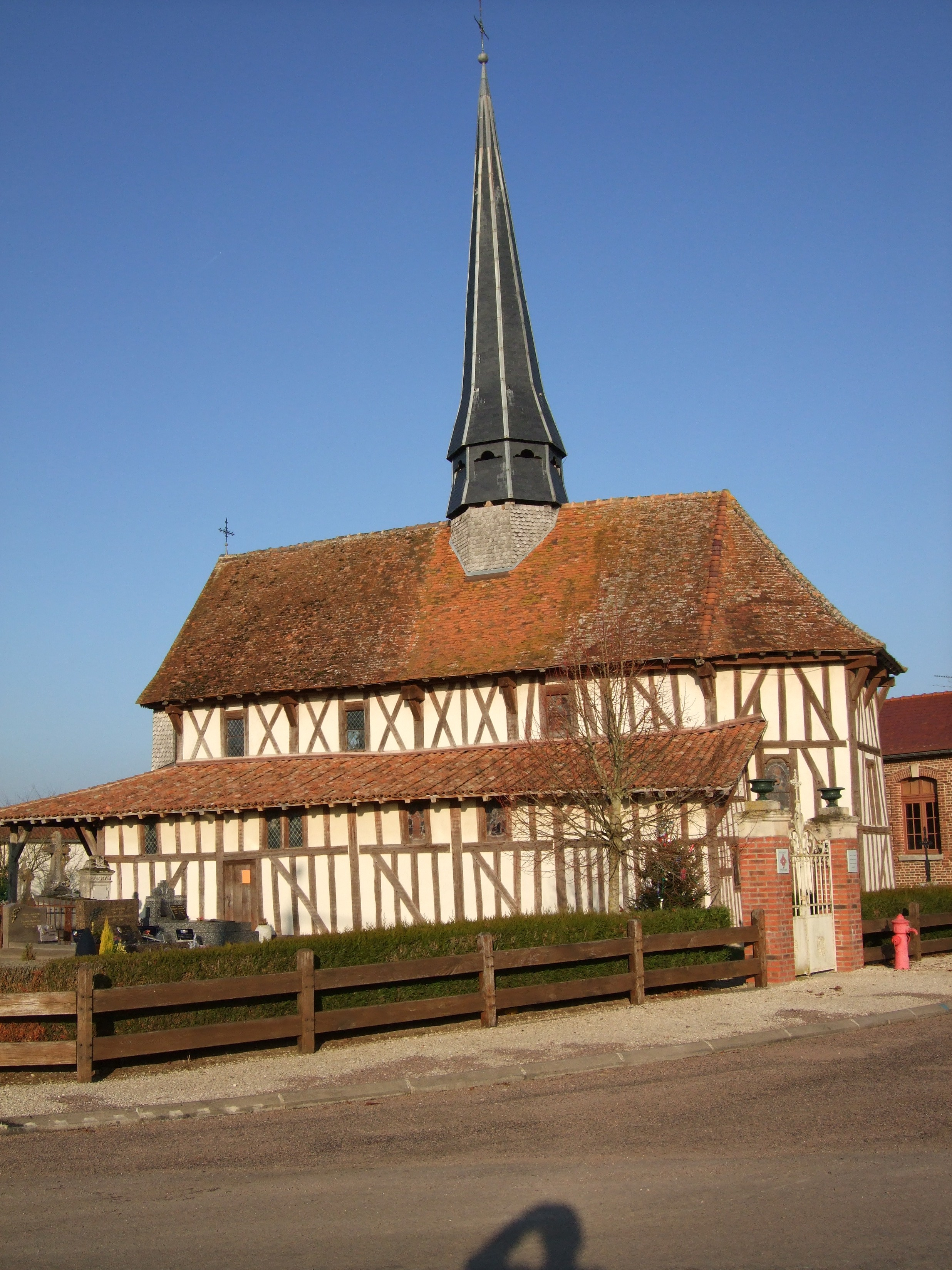 Eglise à pans de bois du 16ème siècle